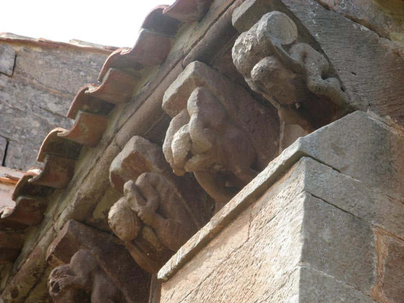 Canecillos